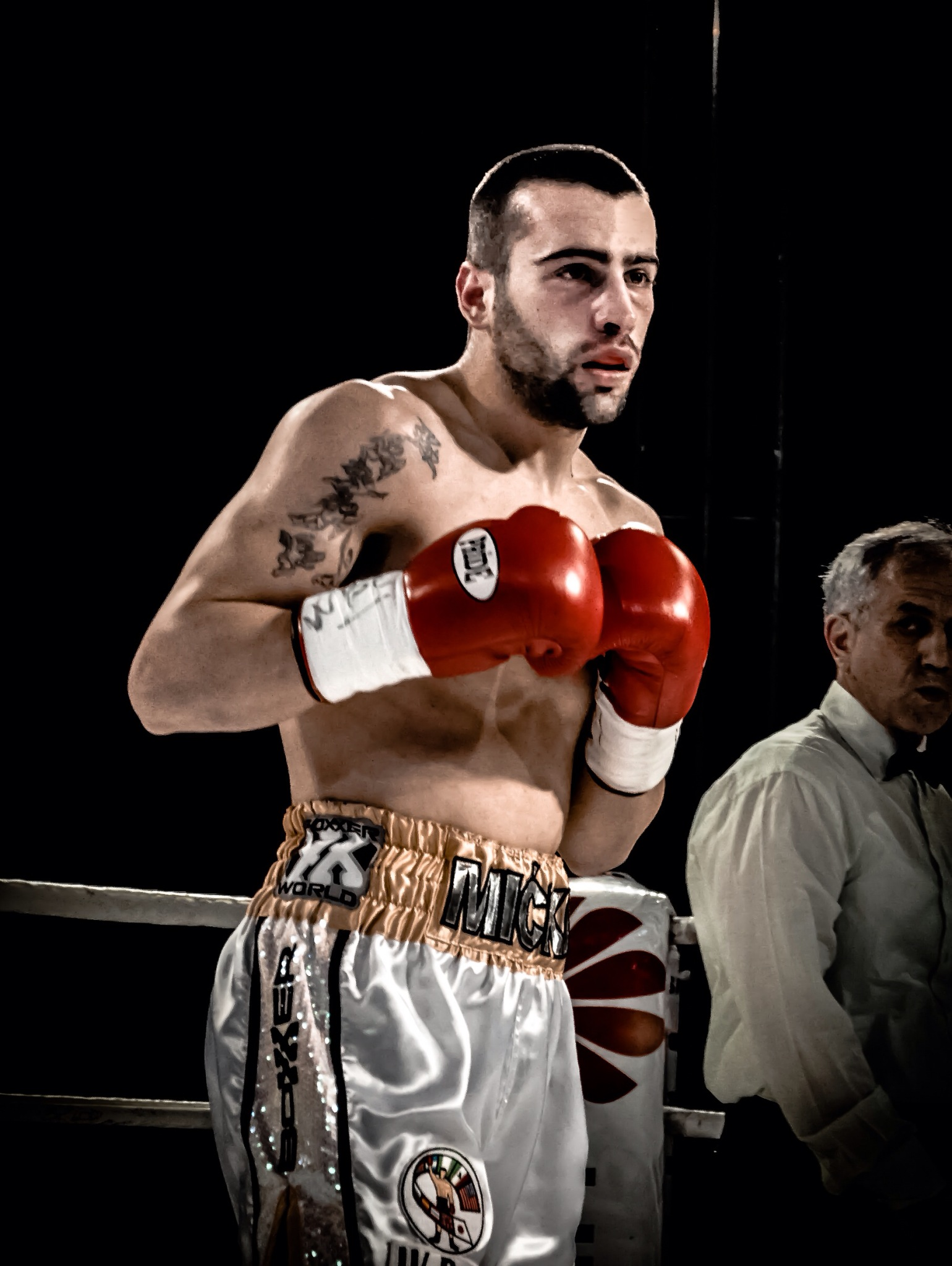 Milorad Žižić, crnogorski bokser